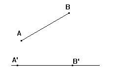 Transprote de Segmento